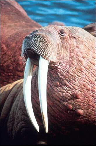 walrus